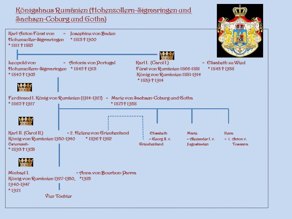 Stammtafel Königshaus Rumänien